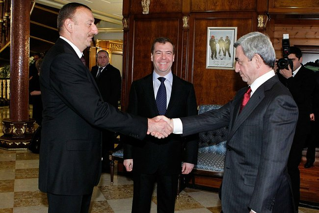 С Президентом Азербайджана Ильхамом Алиевым и Президентом Армении Сержем Саргсяном